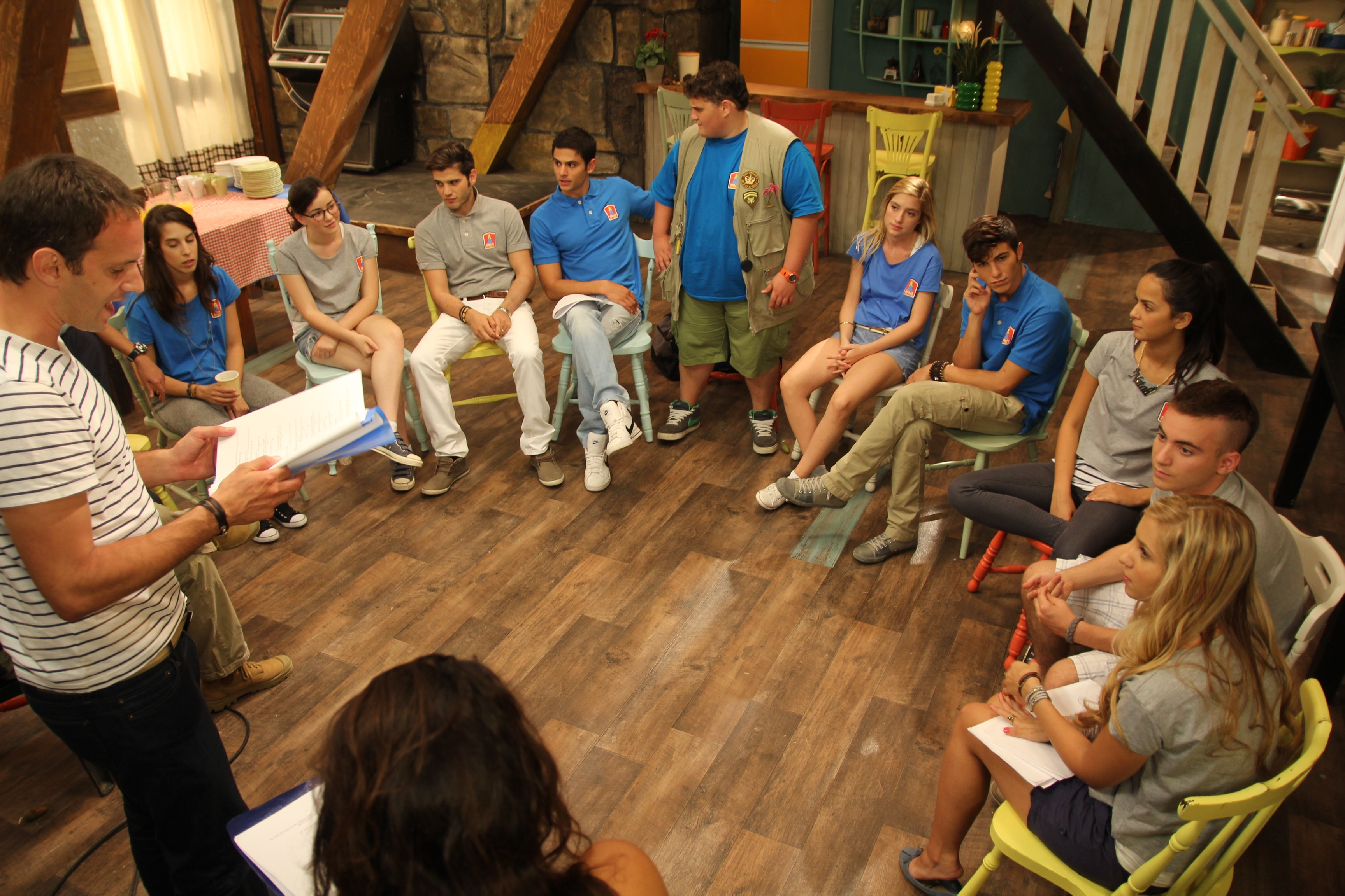 תמונה מתוך הסט של סדרת הטלוויזיה גאליס